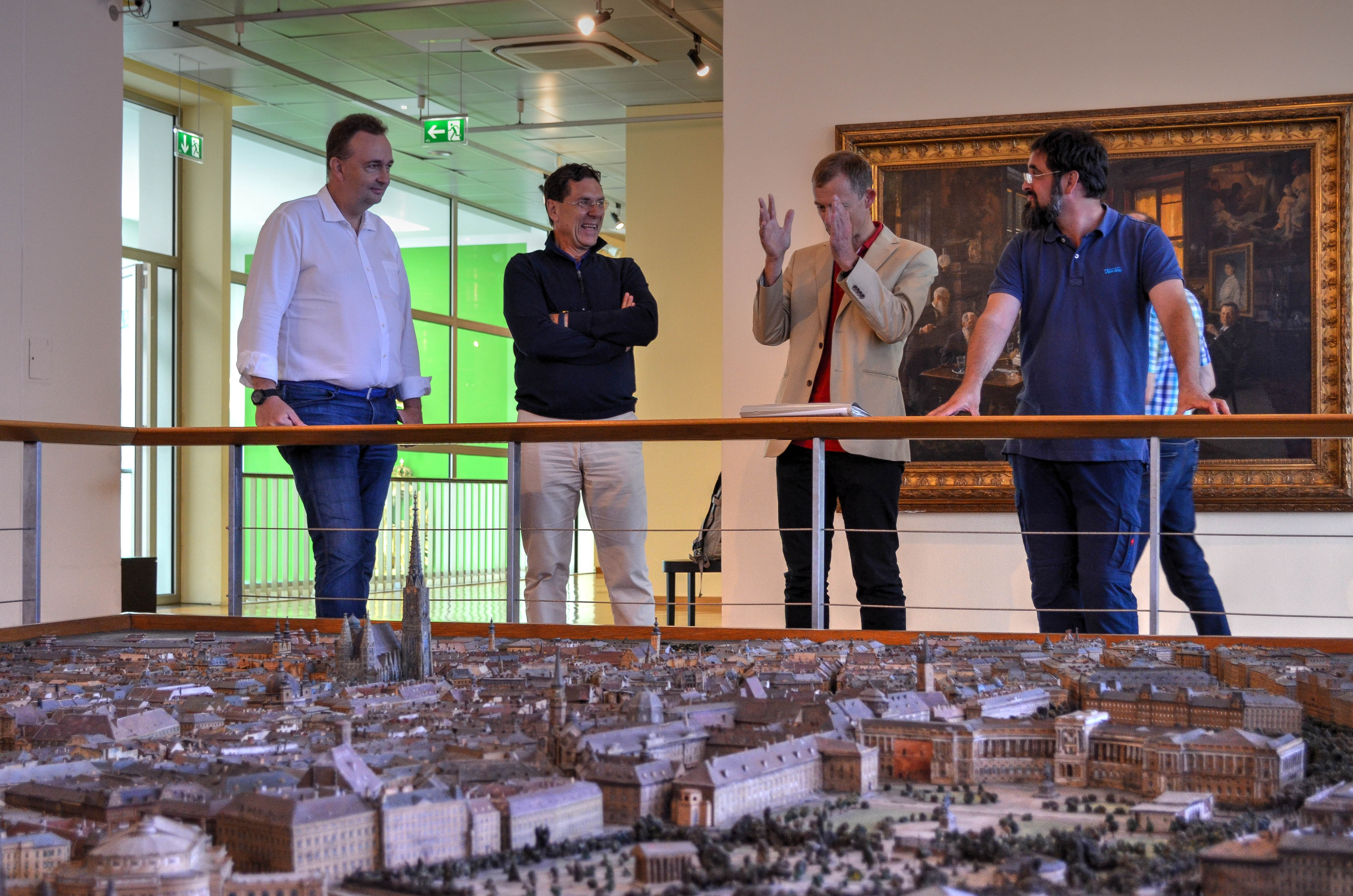 Diskussion über Stadtentwicklung Wien